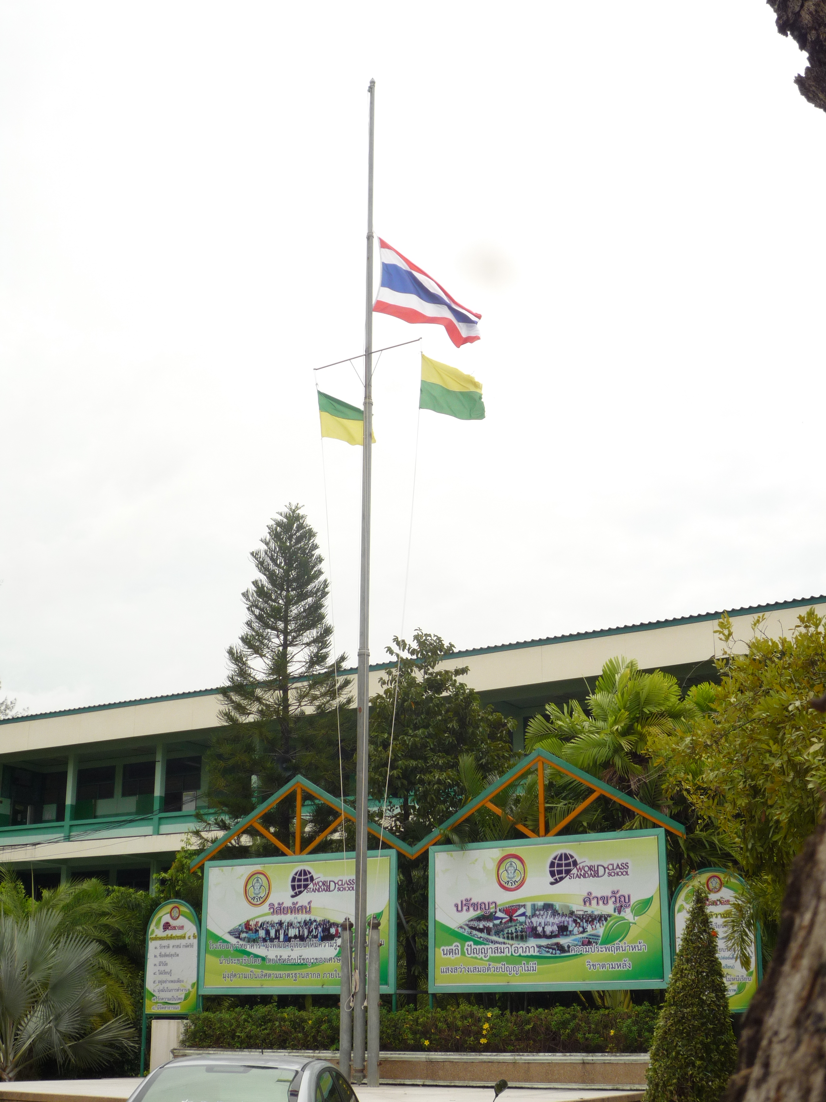 การลดธงครึ่งเสาที่โรงเรียนสุรวิทยาคาร จ.สุรินทร์ เมื่อวันที่ 9 สิงหาคม พ.ศ. 2554